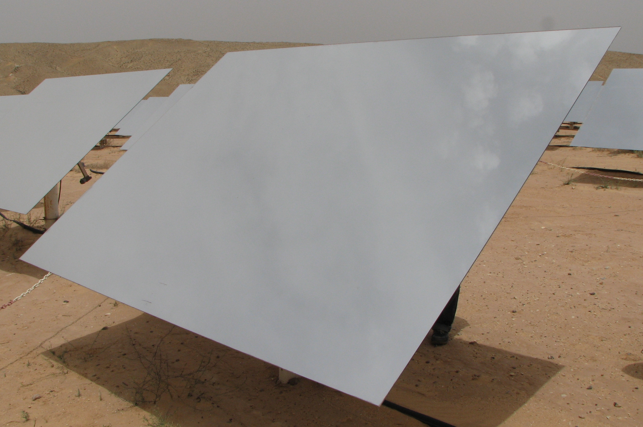 הליוסטטים באתר SEDC בפארק התעשיה רותם